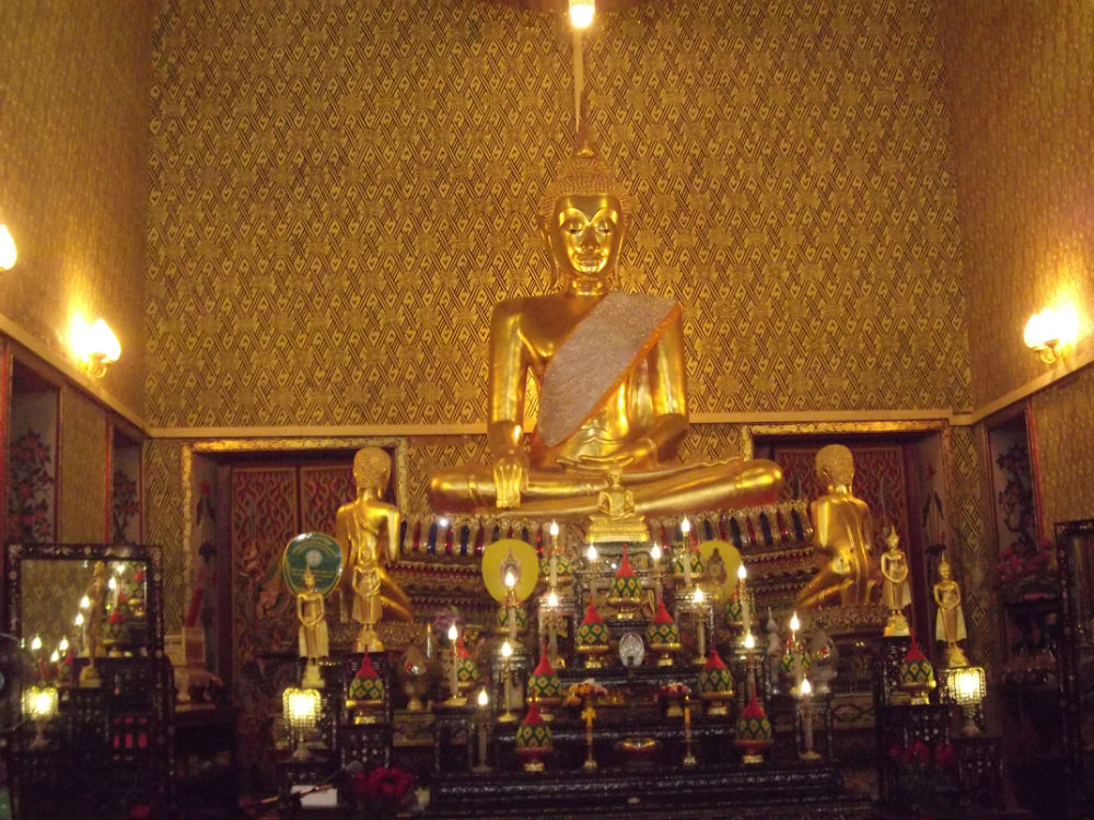 วัดบพิตรพิมุข